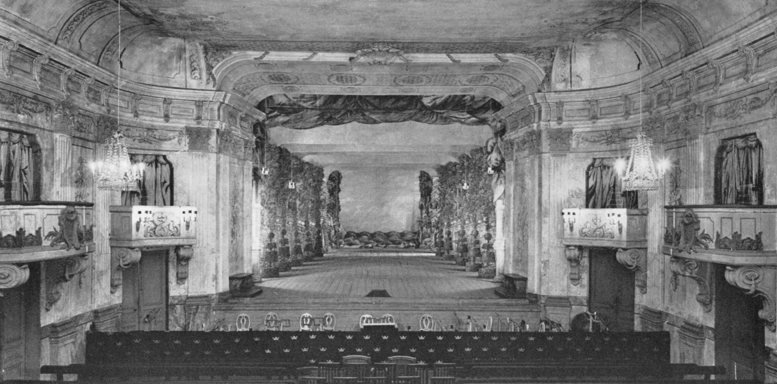 Drottningholms slottsteater salong och scen